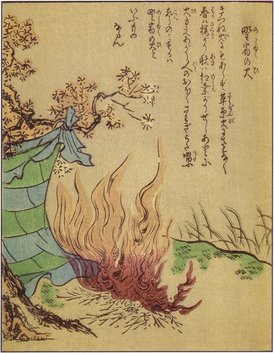 Nojukubi (野宿火) from the Ehon Hyaku Monogatari (絵本百物語)